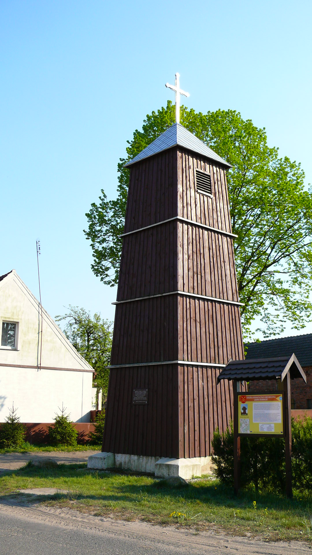 Stare Kramsko - dzwonnica wiejska, drewn., 1929, 2003 (zabytek nr 1948 z 21.04.1971)